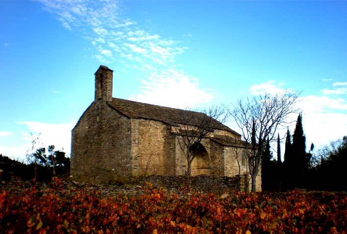 Chapelle de Centeilles à Siran (Hérault)